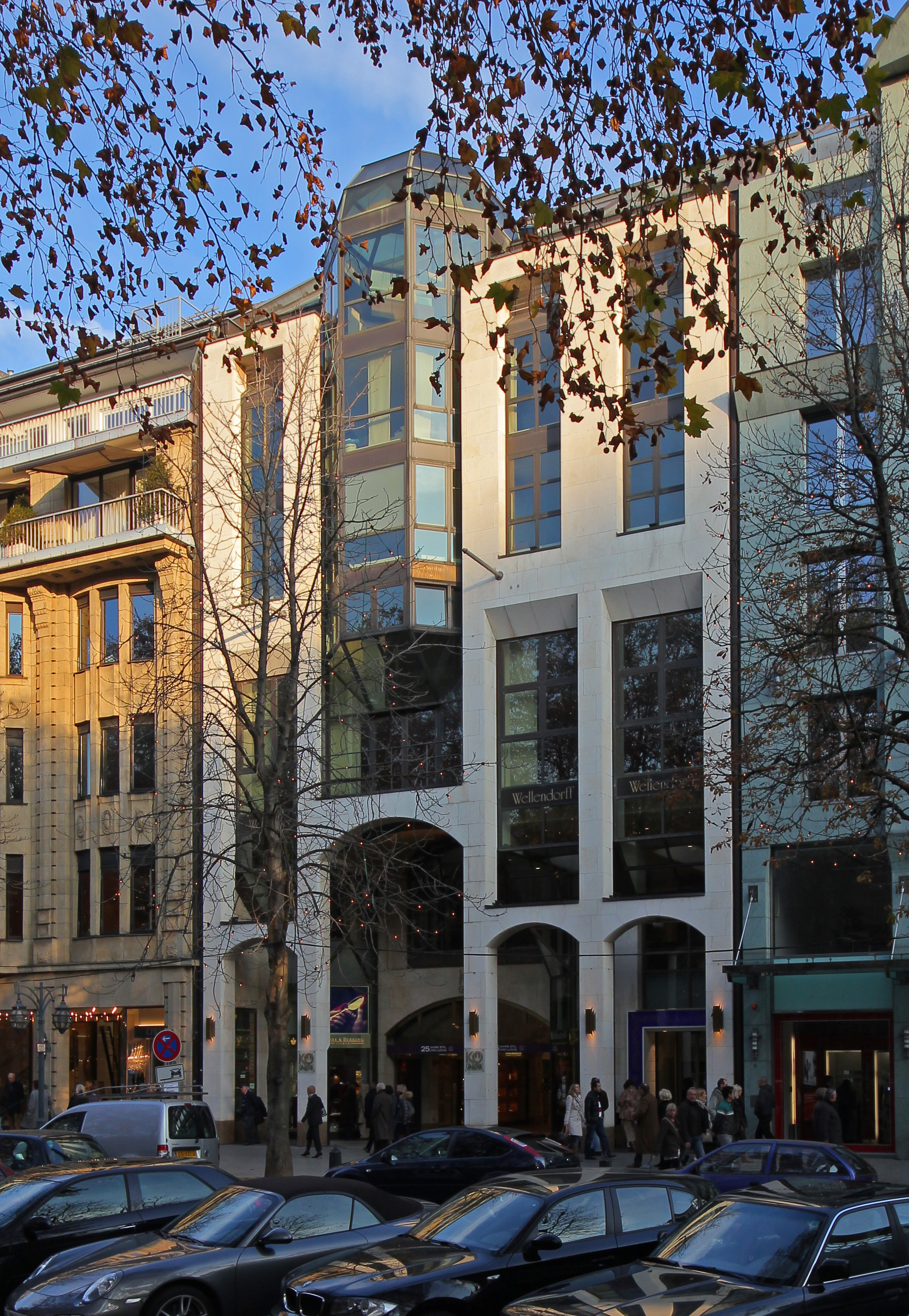 Düsseldorf-Stadtmitte, die Fassade der Einkaufspassage «Kö-Galerie»